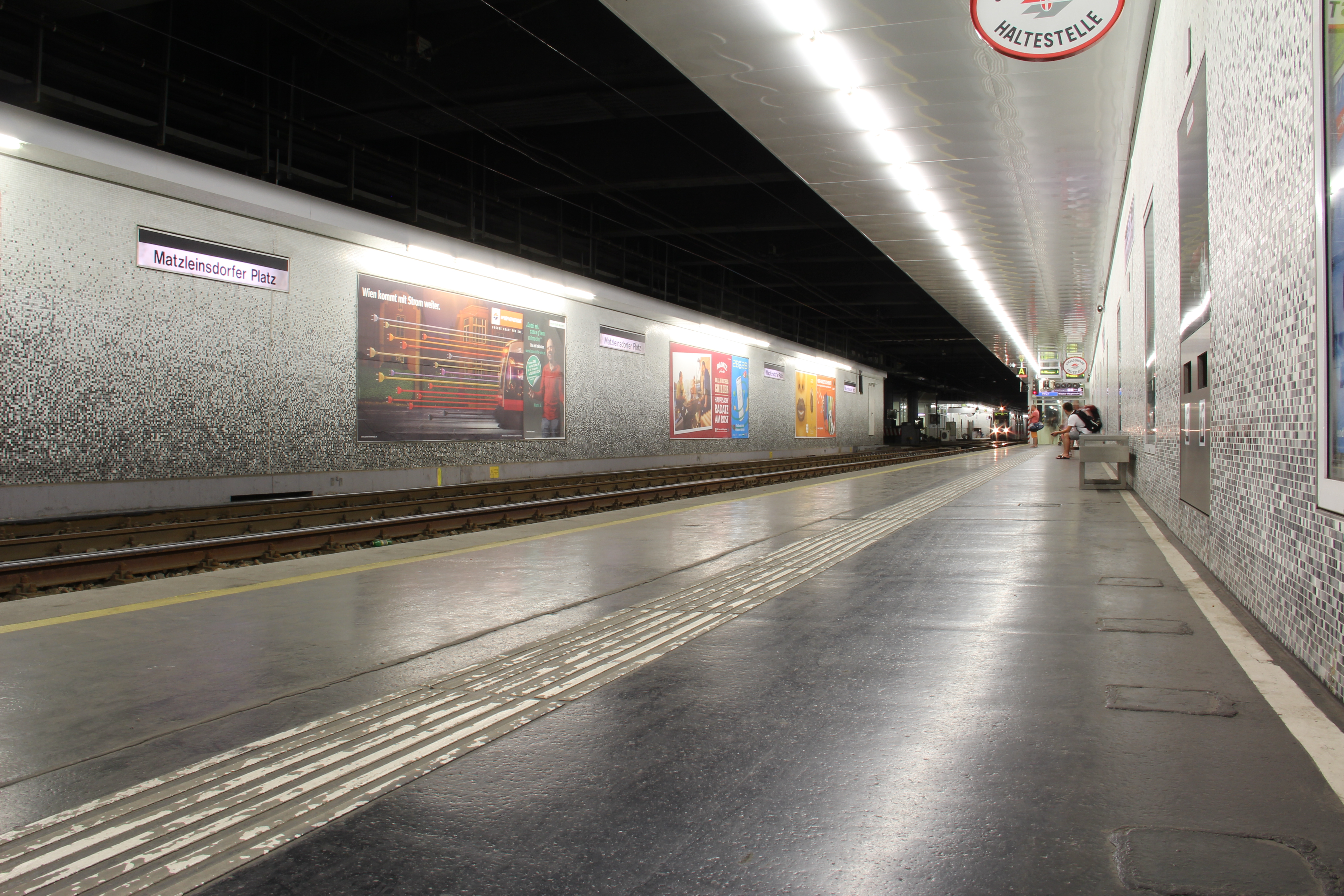 Ustrab-Station Matzleinsdorfer Platz, im Hintergrund ein Zug der Linie 62.